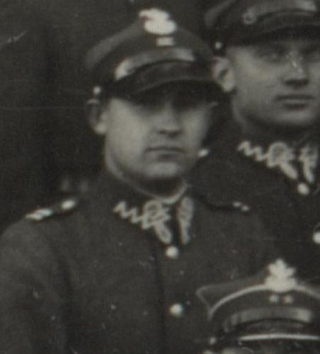 Podchorąży Leon Wiewiórski (1933)